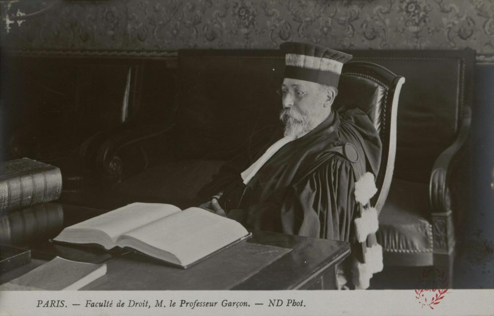 Carte postale